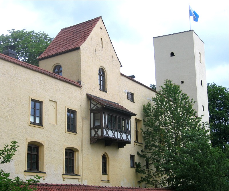 Burg Gruenwald Photograph: Rufus46 Date: 05.06.2006